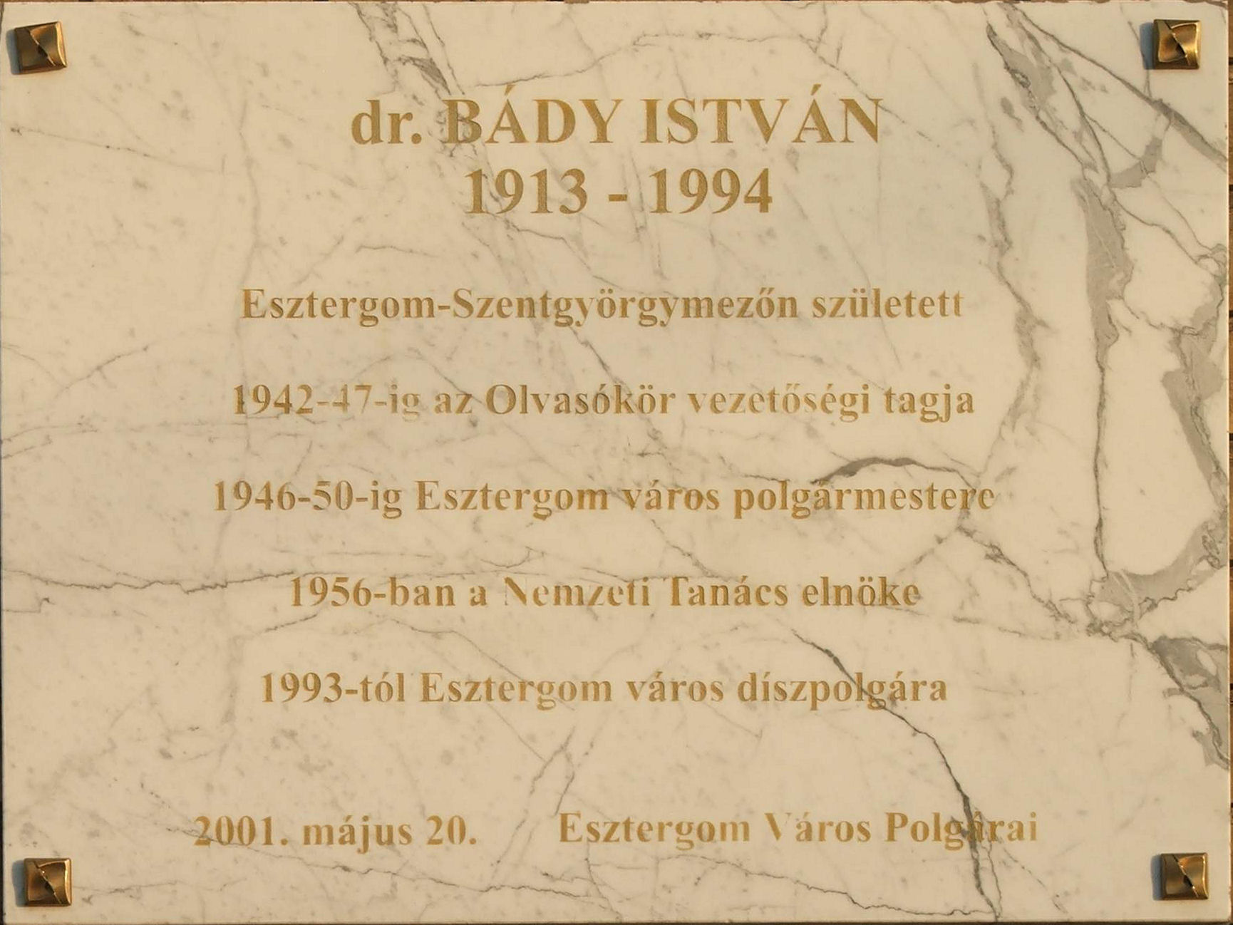 Szentgyörgymezei Olvasókör